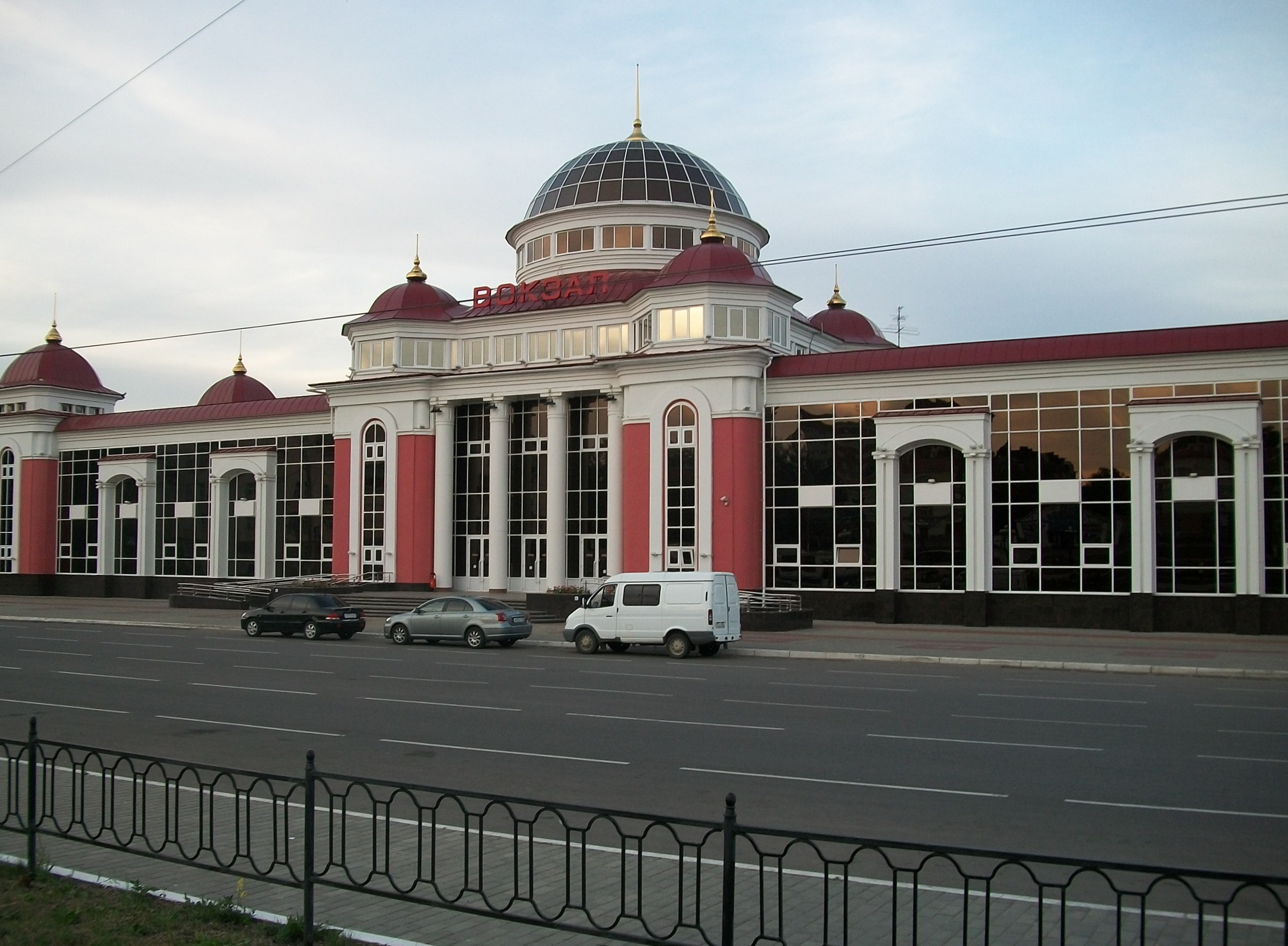 Новое здание железнодорожного вокзала в Саранске (Республика Мордовия). Сдано в эксплуатацию в 2009 году, построено по проекту авторского коллектива института «Саранскгражданпроект» на месте старого (созданного в 1941 году) здания вокзала. Размеры здания в плане 82 х 21 м. Центральная часть 3-этажная, боковые 2-этажные, имеется еще один (цокольный) этаж[1].